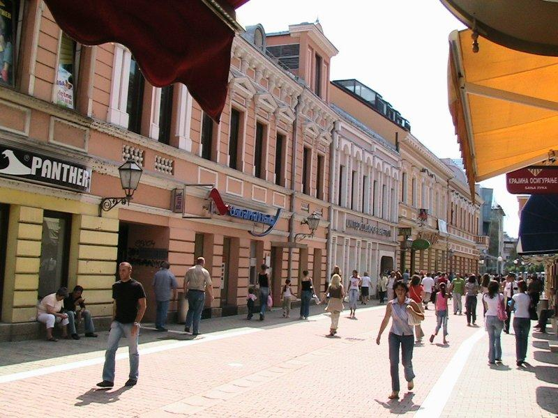 Boutiques and Stores in Gospodska street in Banja Luka, Bosnia and Herzegovina/La rue Godpodska à Banja Luka, Bosnie-Herzégovine